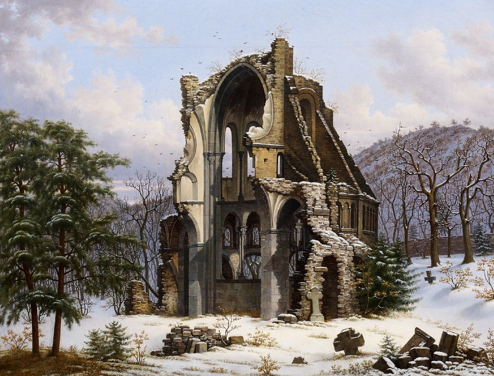 Klosterruine Heisterbach im Winter. Öl auf Leinwand. 47 x 62 cm.